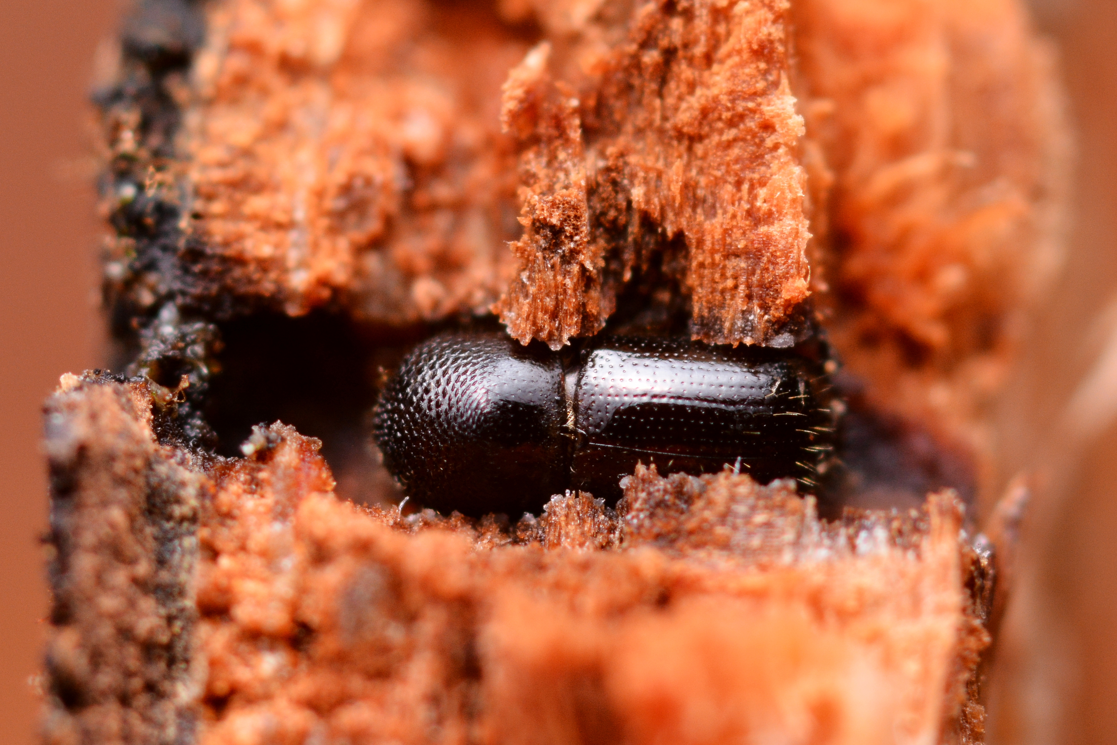 Xylosandrus germanus (Coleoptera - Curculionidae - Scolytinae)